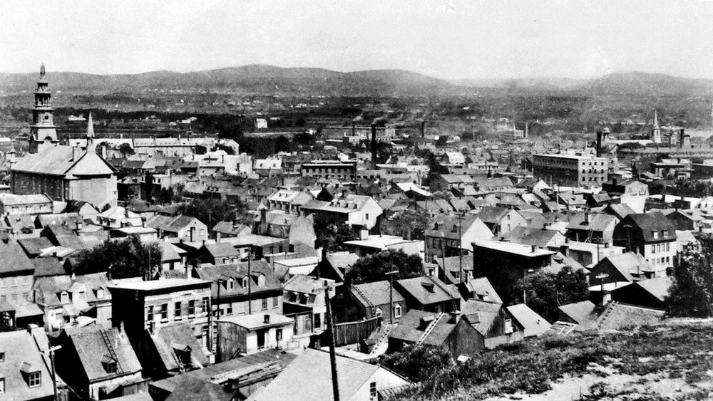 Vue sur Saint-Sauveur depuis le coteau Sainte-Geneviève